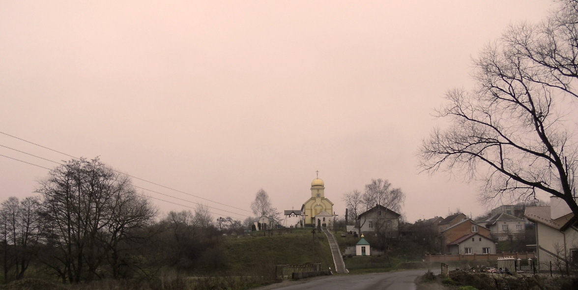 Церква Воздвиження Чесного і Животворного Хреста, селище Рудне, Львів